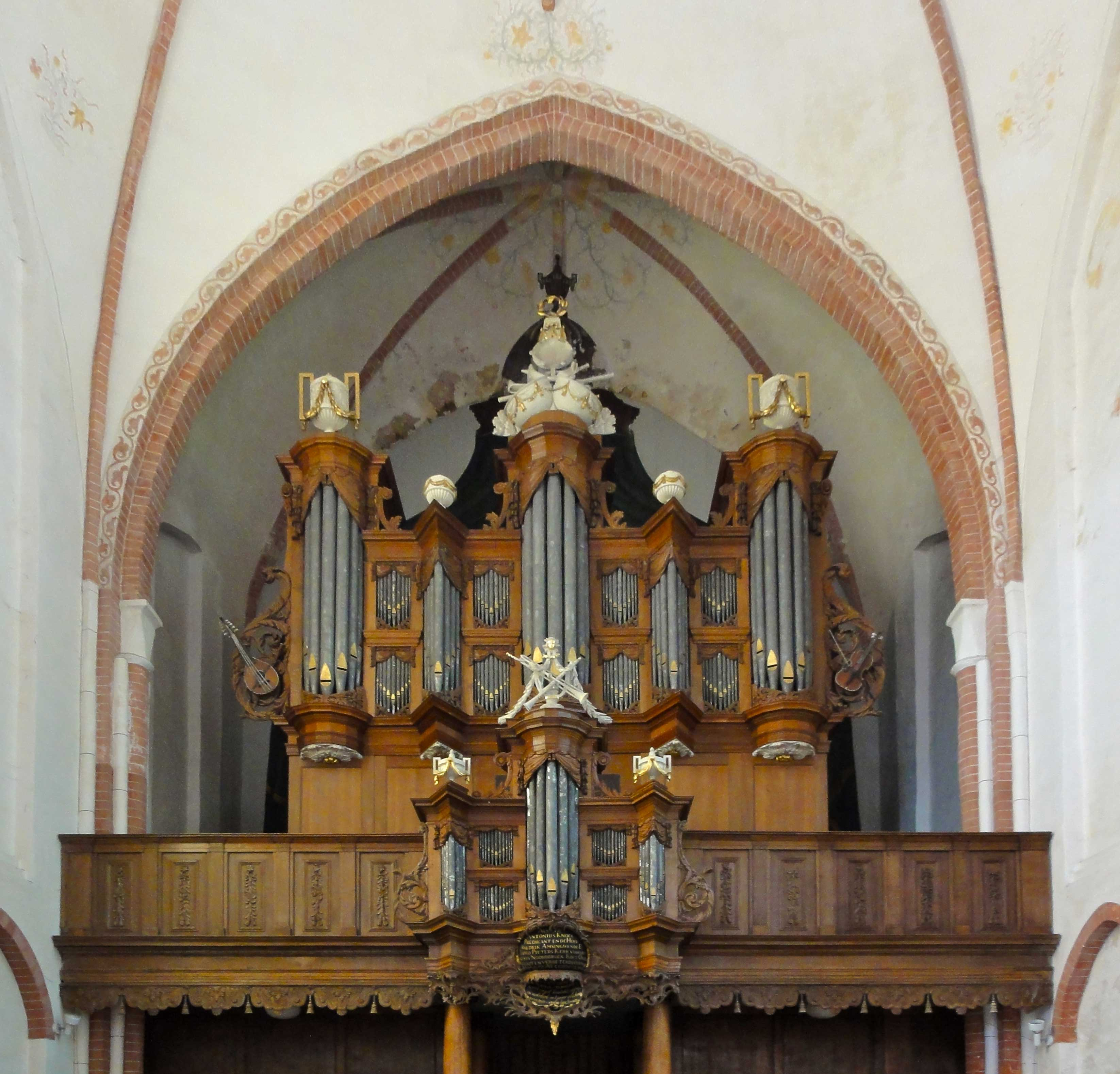 Kerk van Noordbroek met het Arp Schnitgerorgel